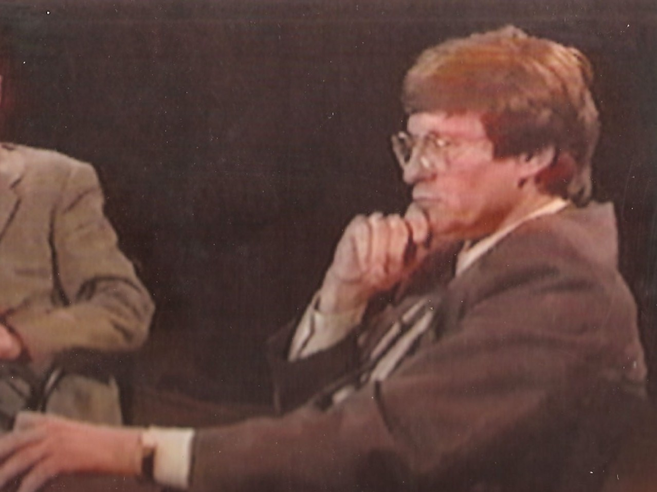 Leszek Balcerowicz w Studio Nowej Telewizji Warszawa w programie A.T.Kijowskiego A Teraz Konkretnie.